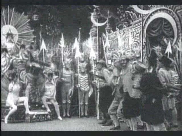 Méliès, viaggio nella luna (1902) 10